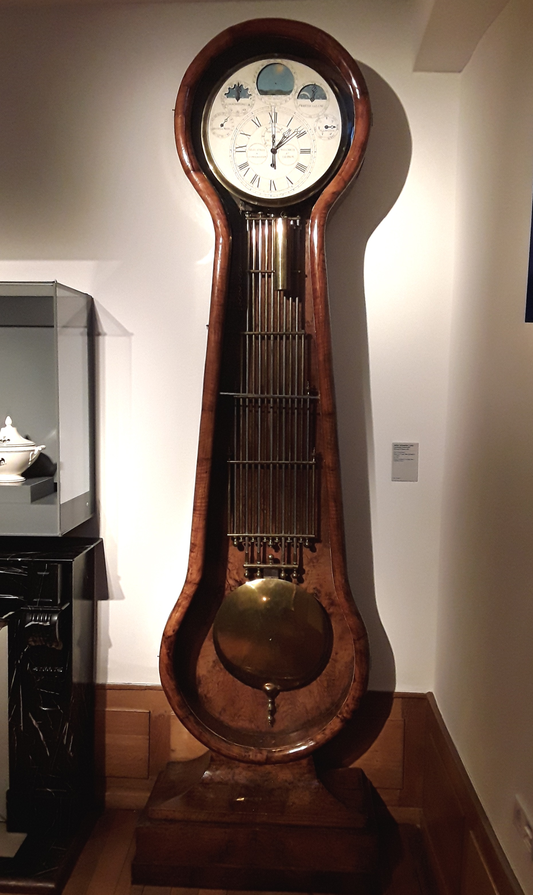 Horloge astronomique à gaine, fabriquée vers 1850 par Joseph Pascal Lebrun (1807 - 1883) à Luxembourg. Mouvement à compensation signé Melchior J. H. Lebrun. Boîtier en noyer plaqué. L'horloge était probablement destinée à la maison Hedin à Clausen (Luxembourg). L'horloge est exposée au Musée national d'histoire et d'art à Luxembourg.